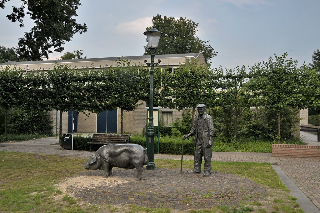 Oude Molenweg de Mortel (Gemert-Bakel/The Netherlands). De inwoners van de Mortel werden vanwege de vele varkenshouderijen ‘varkens’ genoemd. Dit verklaart ook het verschijnsel in de Peel van het te koop aanbieden van hele en halve varkenskoppen. Made by Toon Grassens.